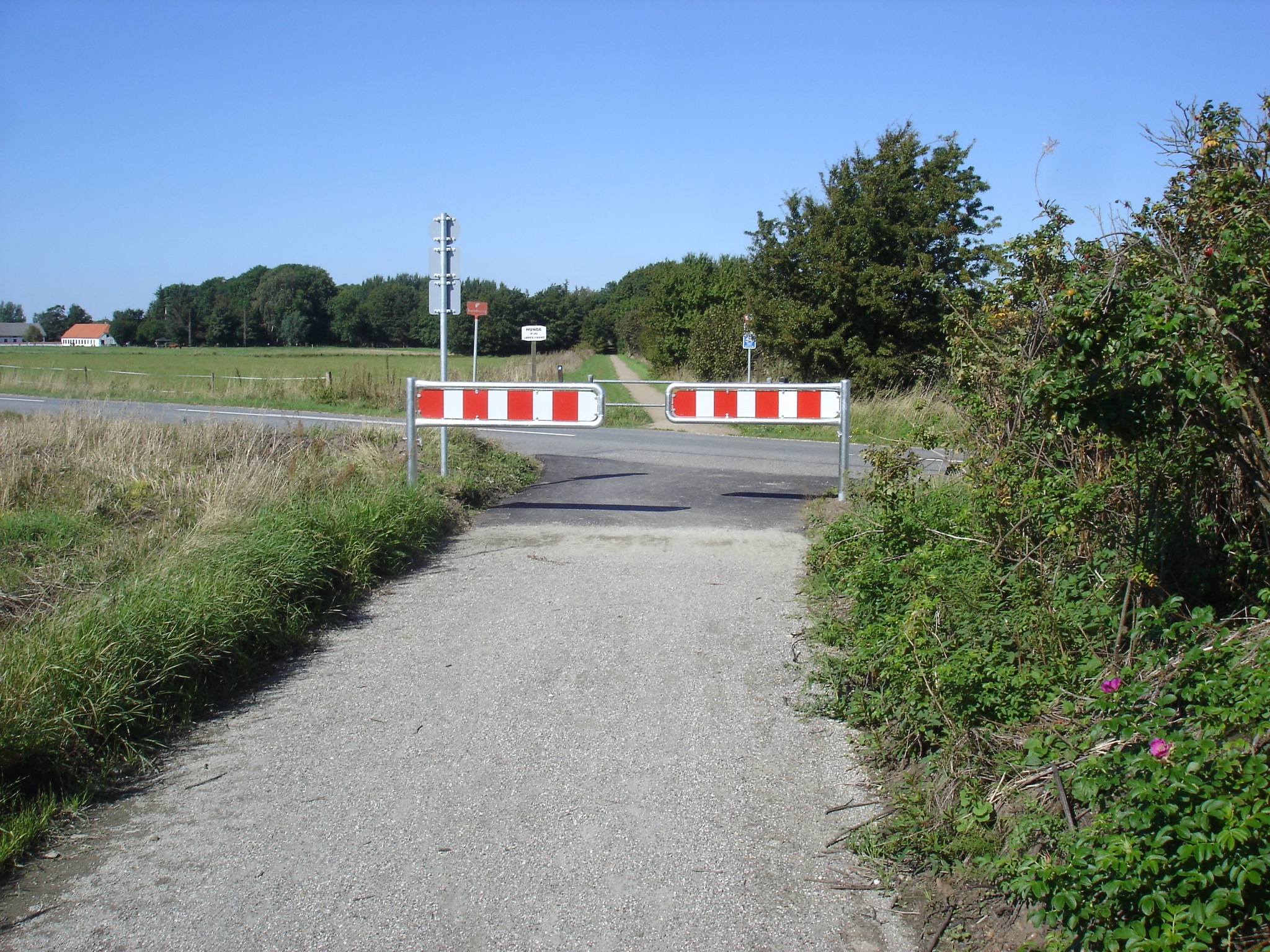 Vadum Banesti krydser Vadum Kirkevej - her lå Vadum Kirke trinbræt fra 1934